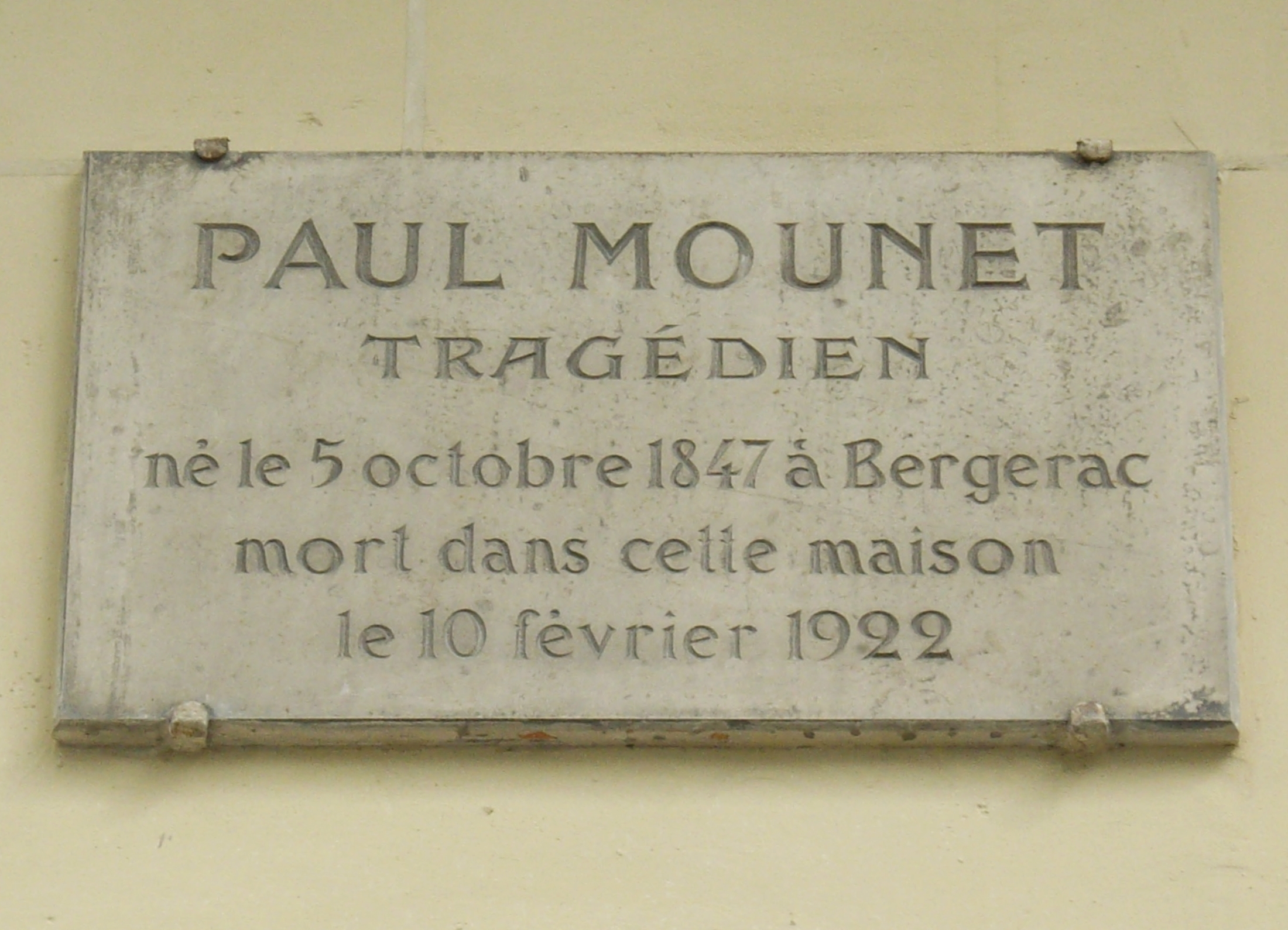 Plaque apposée au n° 63 du boulevard Saint-Michel, Paris 5e, où mourut le tragédien Paul Mounet (1847-1922) le 10 février 1922.